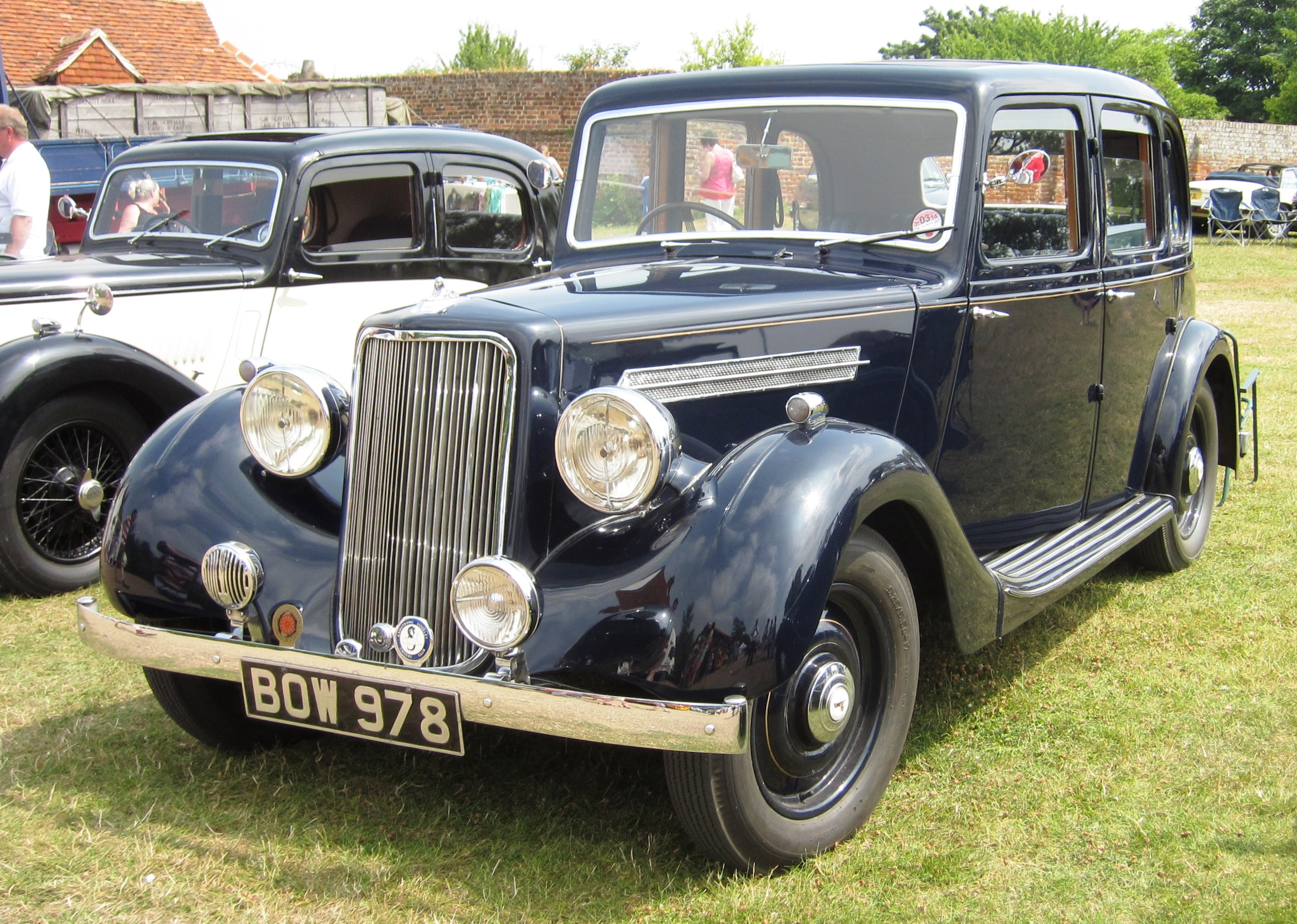 Armstrong Siddeley 16 immat 1938